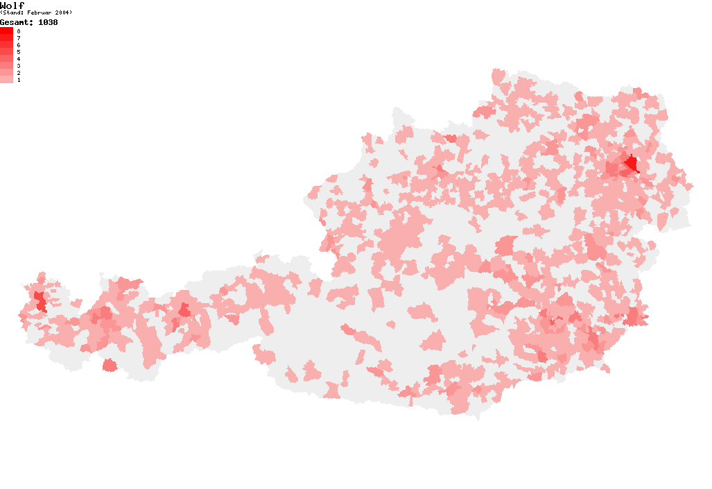 Verteilung des Nachnamens Wolf in Österreich nach dem Telefonbuch mit Stand vom Februar 2004